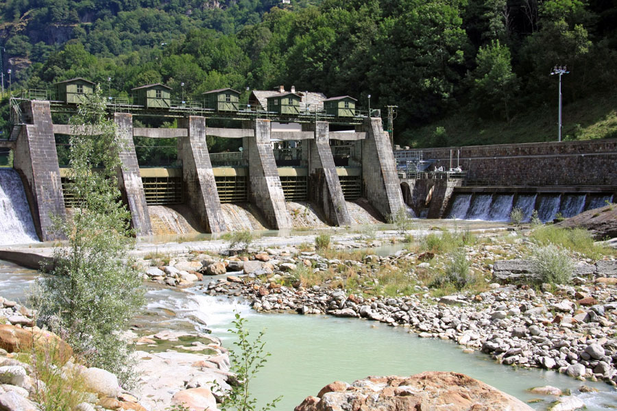 Sbarramento sul Torrente Lys tra i comune di Issime e Fontainemore